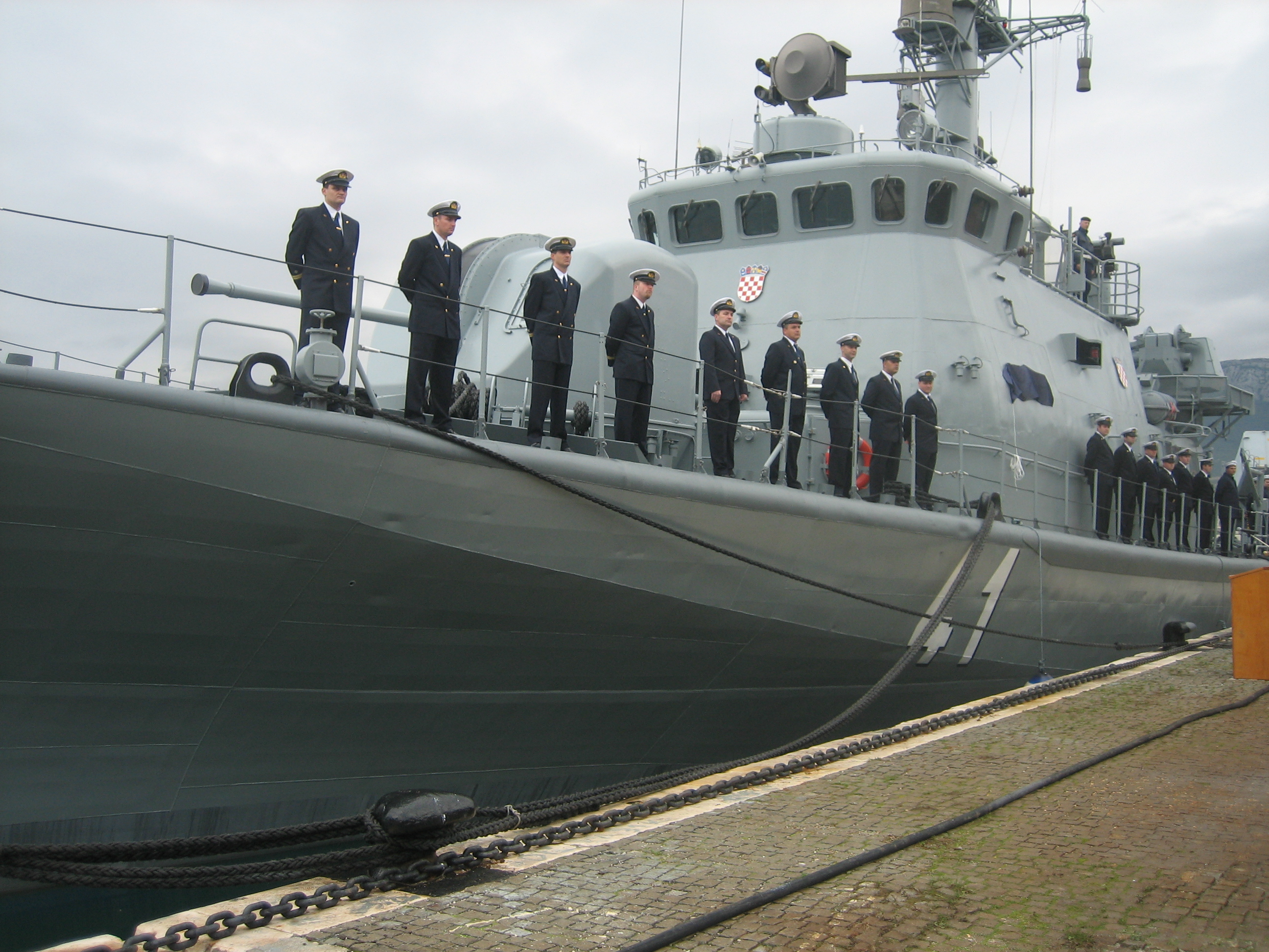 Rubni pozdrav na RTOP-41 Vukovar